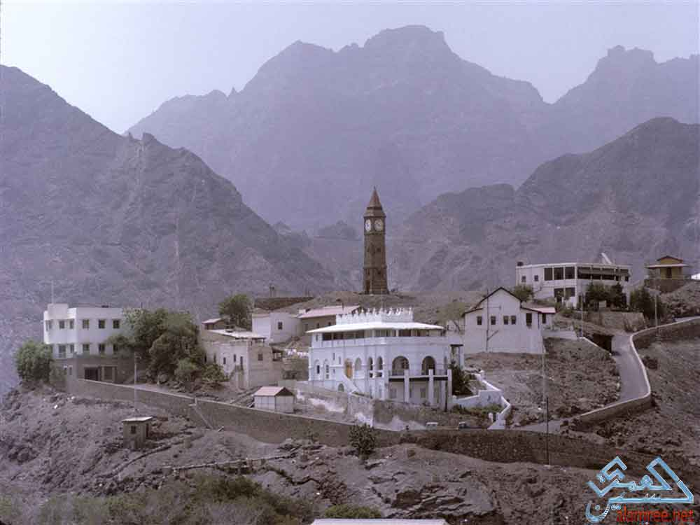 ساعة بيج بن الصغرى التواهي عدن عام 1964